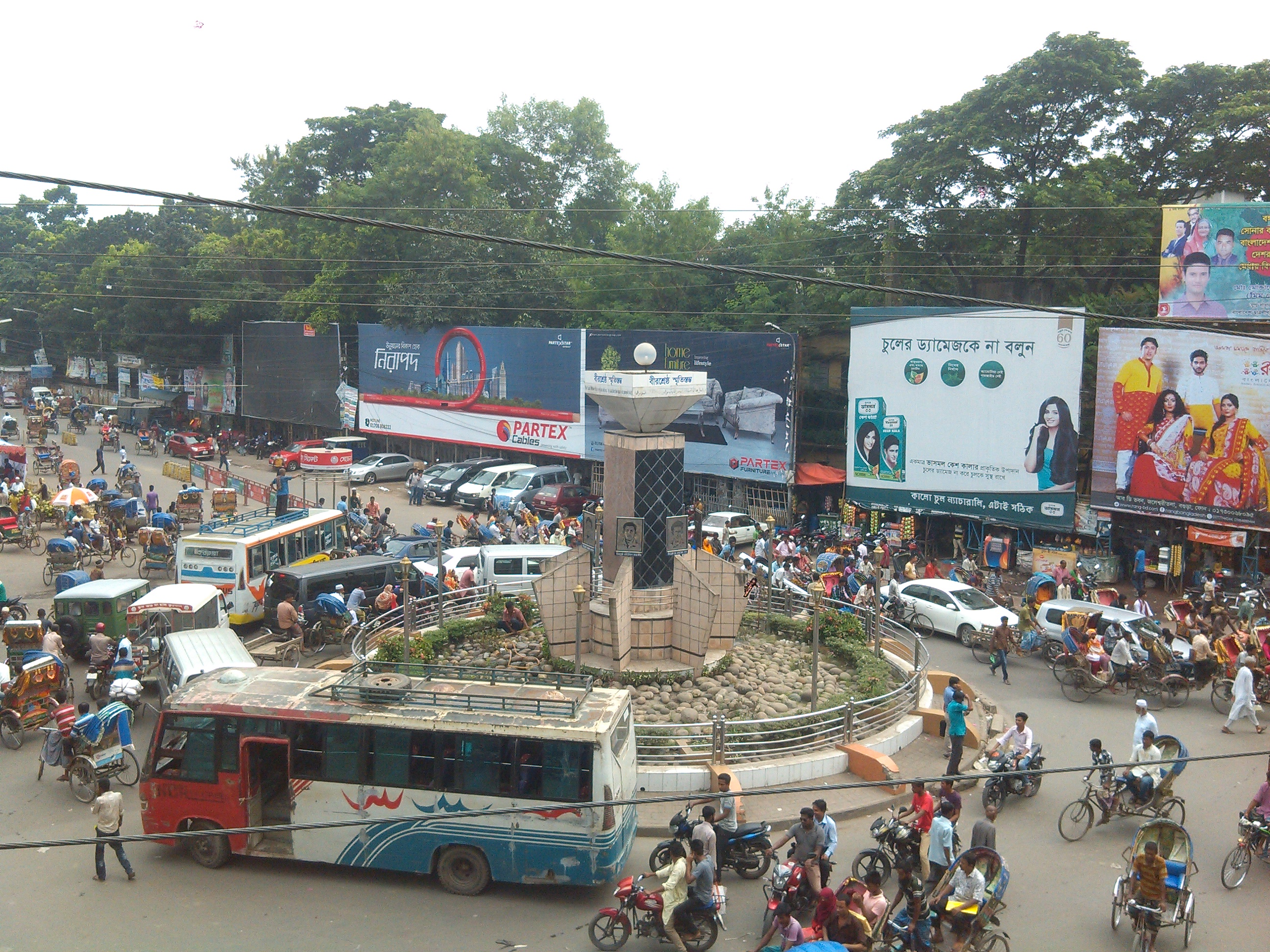 বীরশ্রেষ্ঠ স্মৃতি স্তম্ভ, সাতমাথা